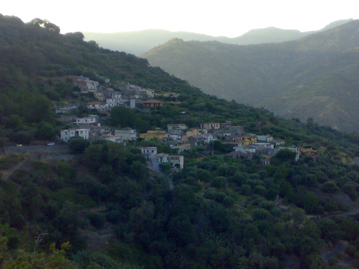 Frazione Fautarì di Santa Teresa di Riva